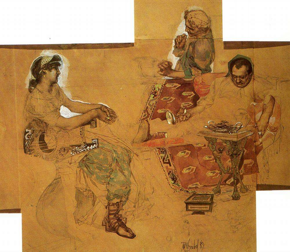 Академическая зарисовка 1883 года